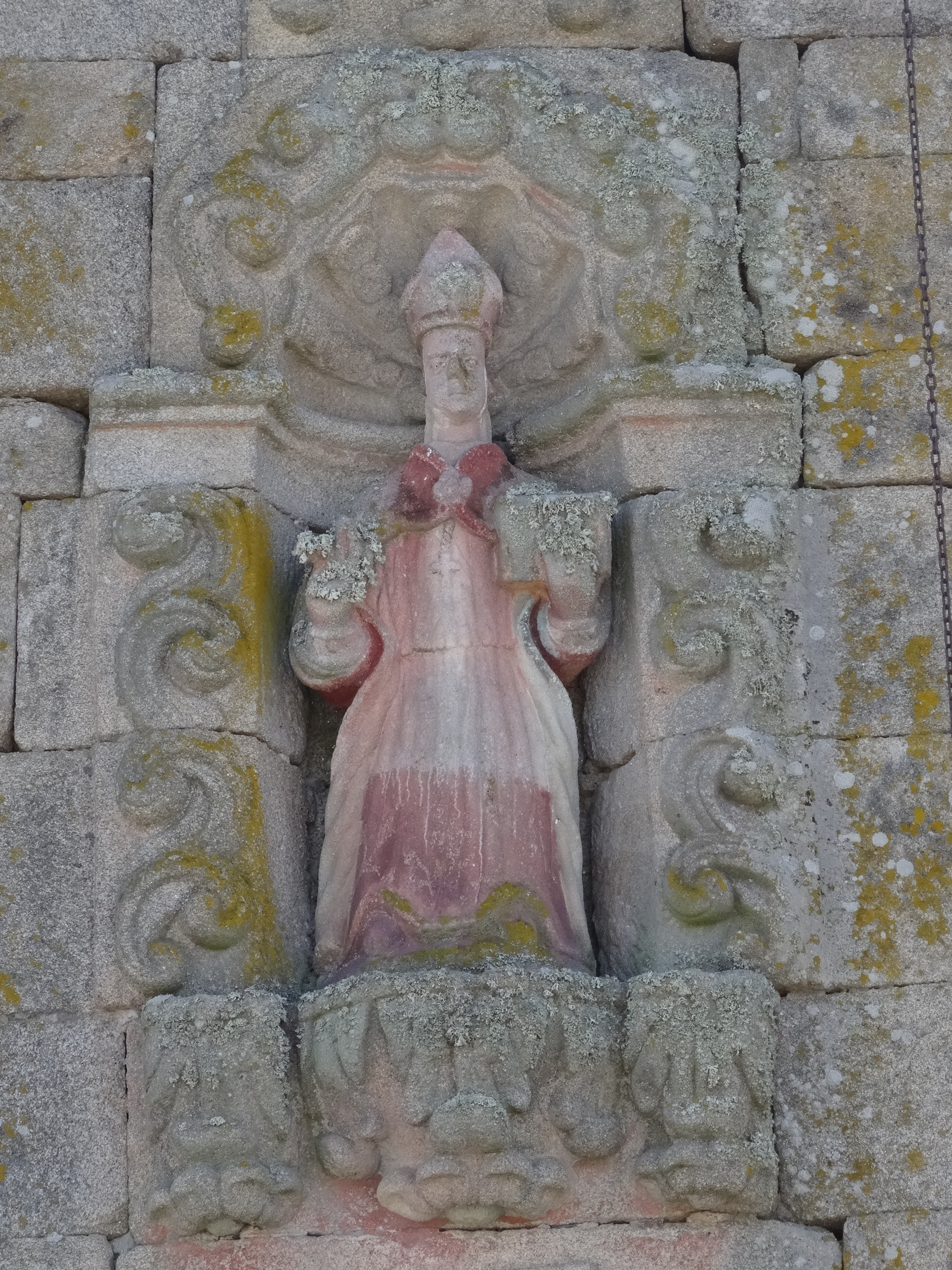 Escultura na igrexa de San Cibrao de Lama Má, Baños de Molgas, Ourense.